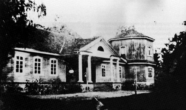 Беларуская (тарашкевіца): Сурвілішкі (Surviliški), сядзіба Паплаўскіх (Papłaŭski)